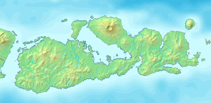 Kaart sumbawa Bron